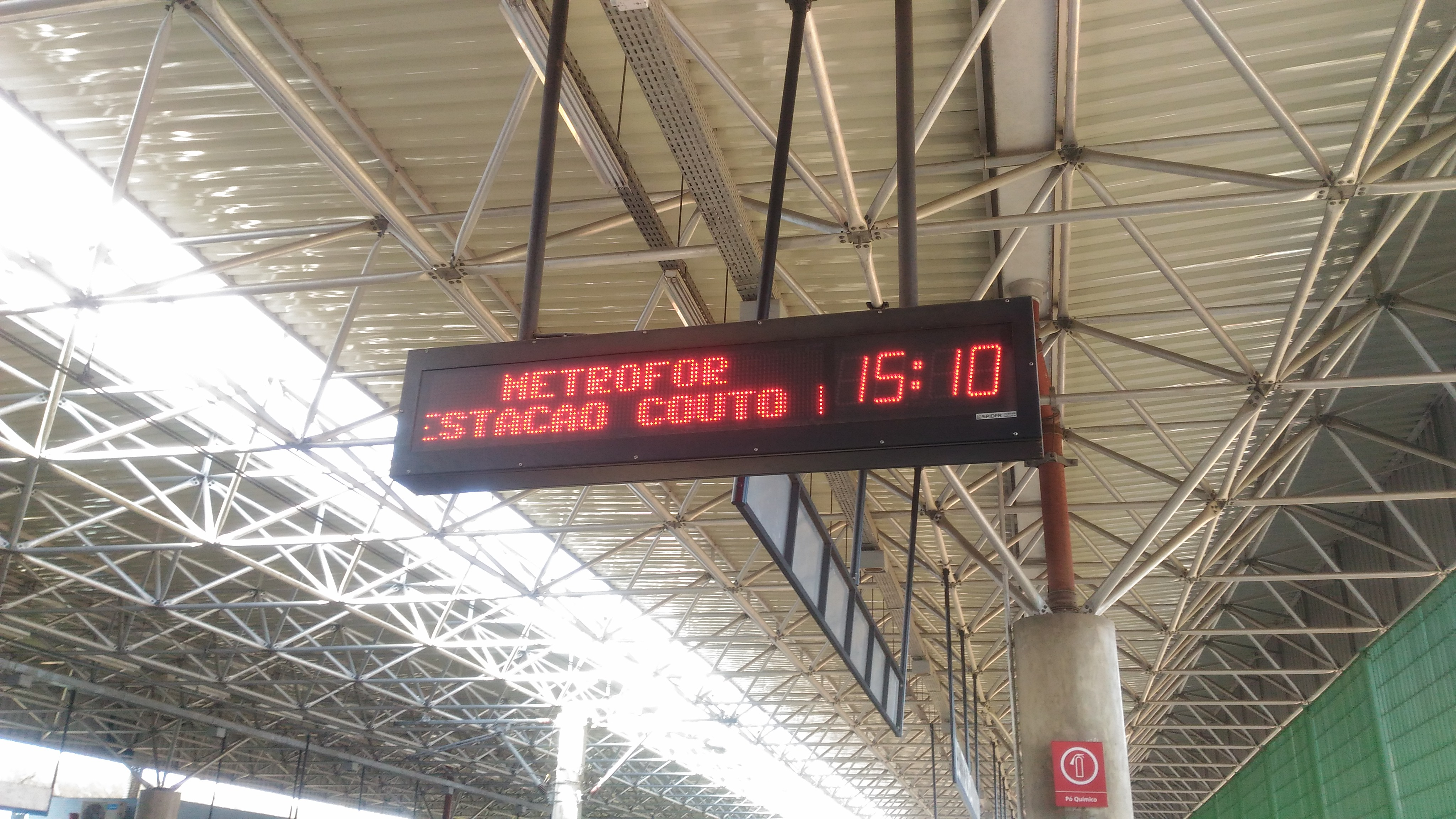 Painel de informações na estação Couto Fernandes da Linha sul do metrô.